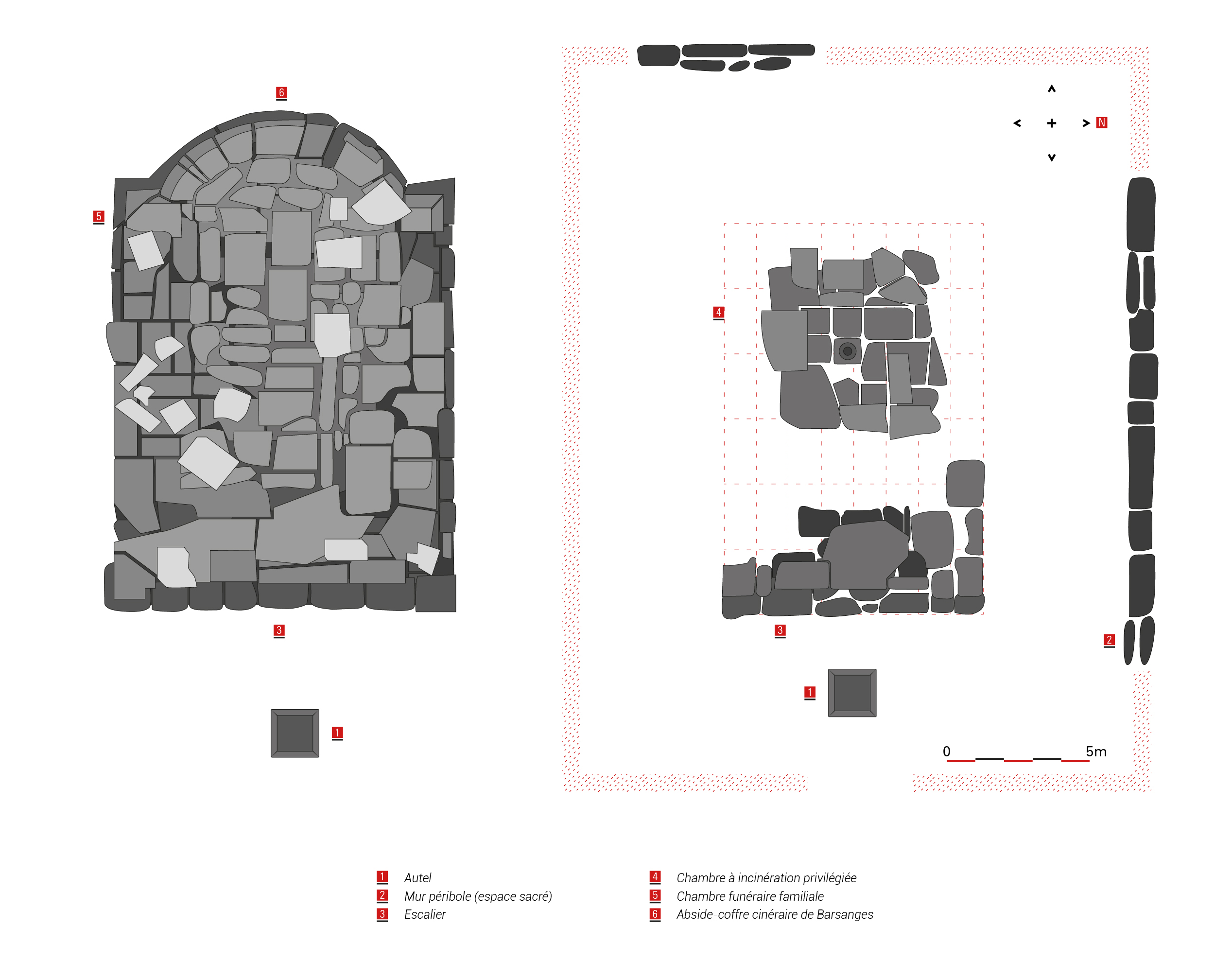 Plan de la partie sanctuaire du site gallo-romain des Cars d'après les travaux de D. Tardy, Jean-Louis Paillet et Marie-Christine Monguillan